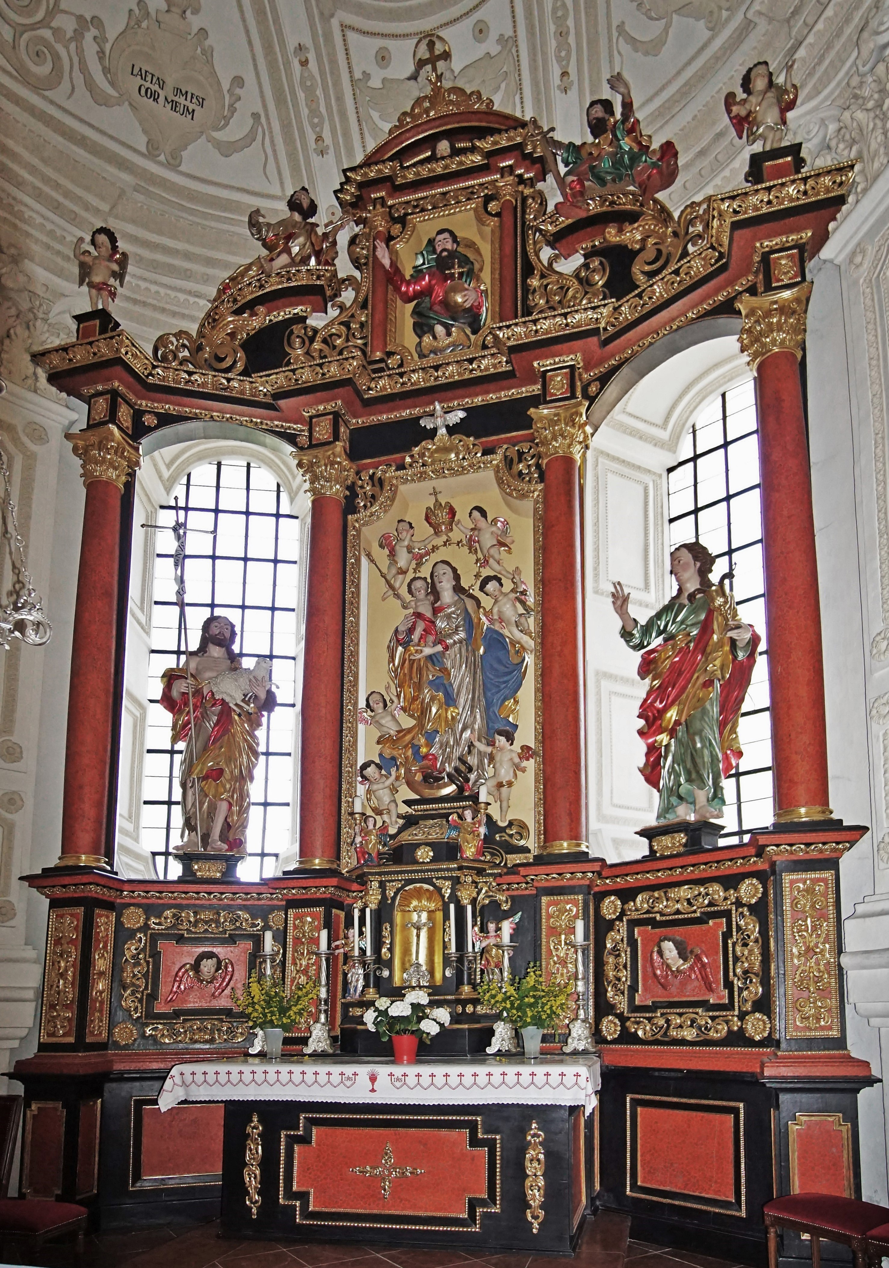 Hochaltar der Kirche St. Johann Baptist und Heilig Kreuz in Westerndorf am Wasen (Rosenheim)